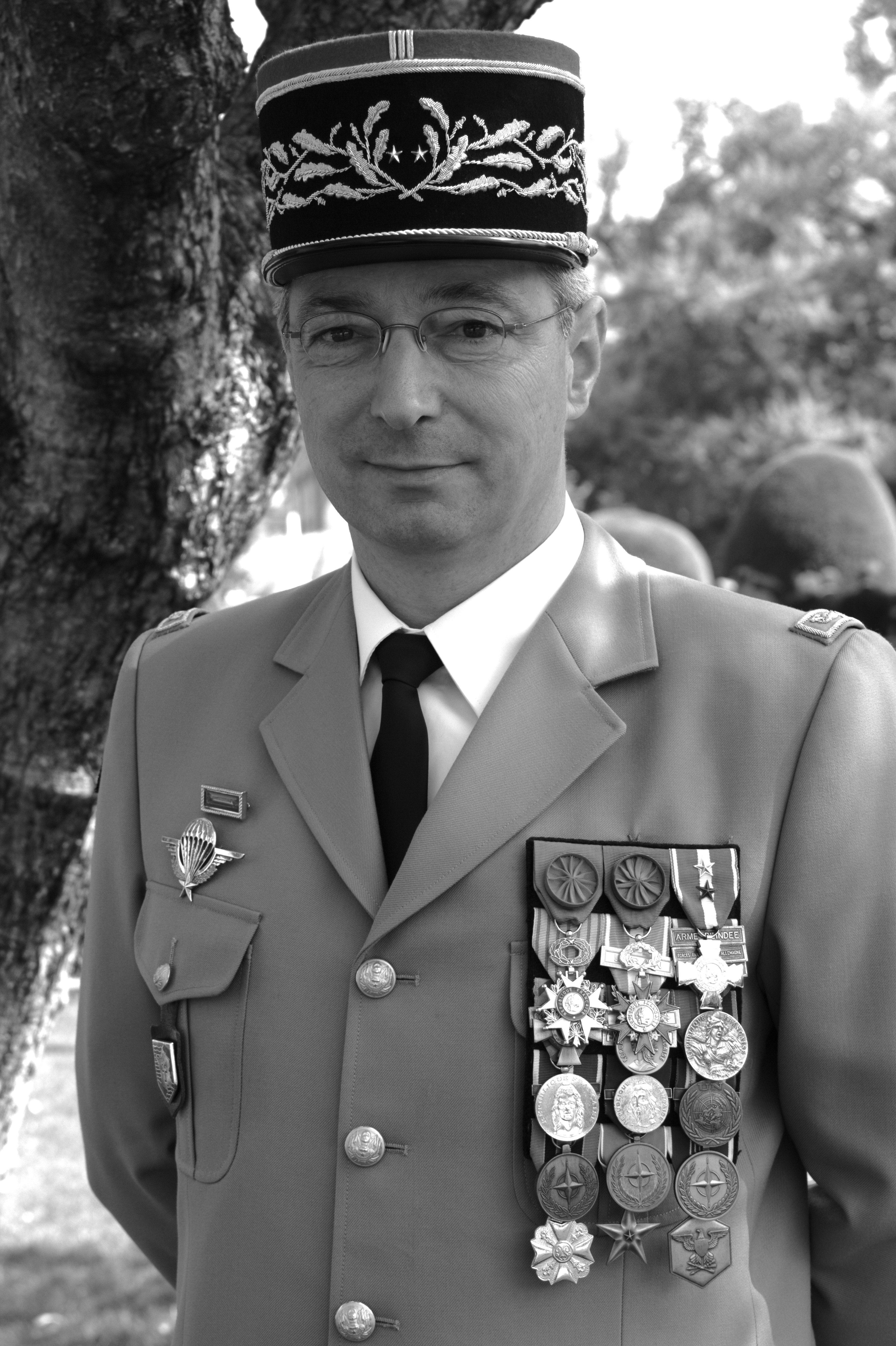 Le général Éric Hautecloque-Raysz , gouverneur militaire de Strasbourg.